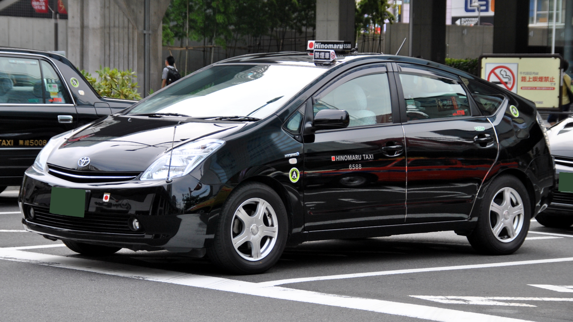 日の丸交通のトヨタ・プリウス（2代目）